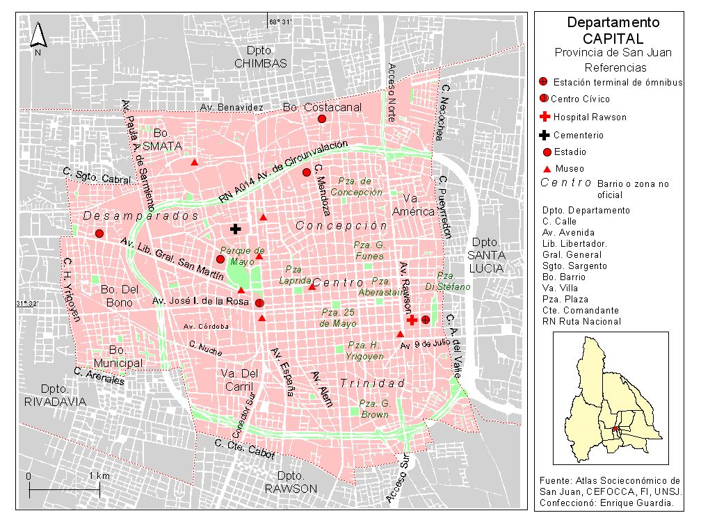 Mapa que representa el territorio del departamento Capital, provincia de San Juan, Argentina